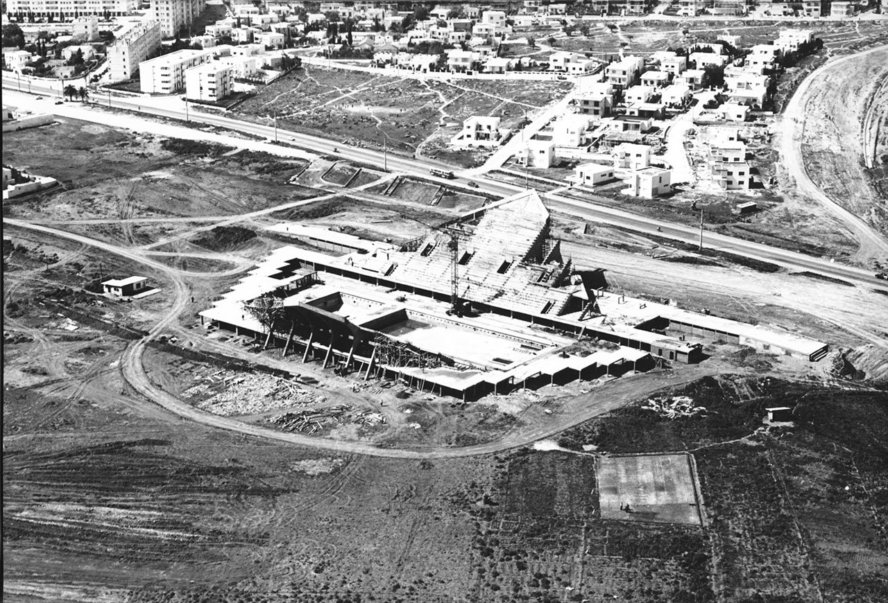 Luoghi dei VI Giochi del Mediterraneo di Tunisi 1967 - Piscina olimpica El Menzah